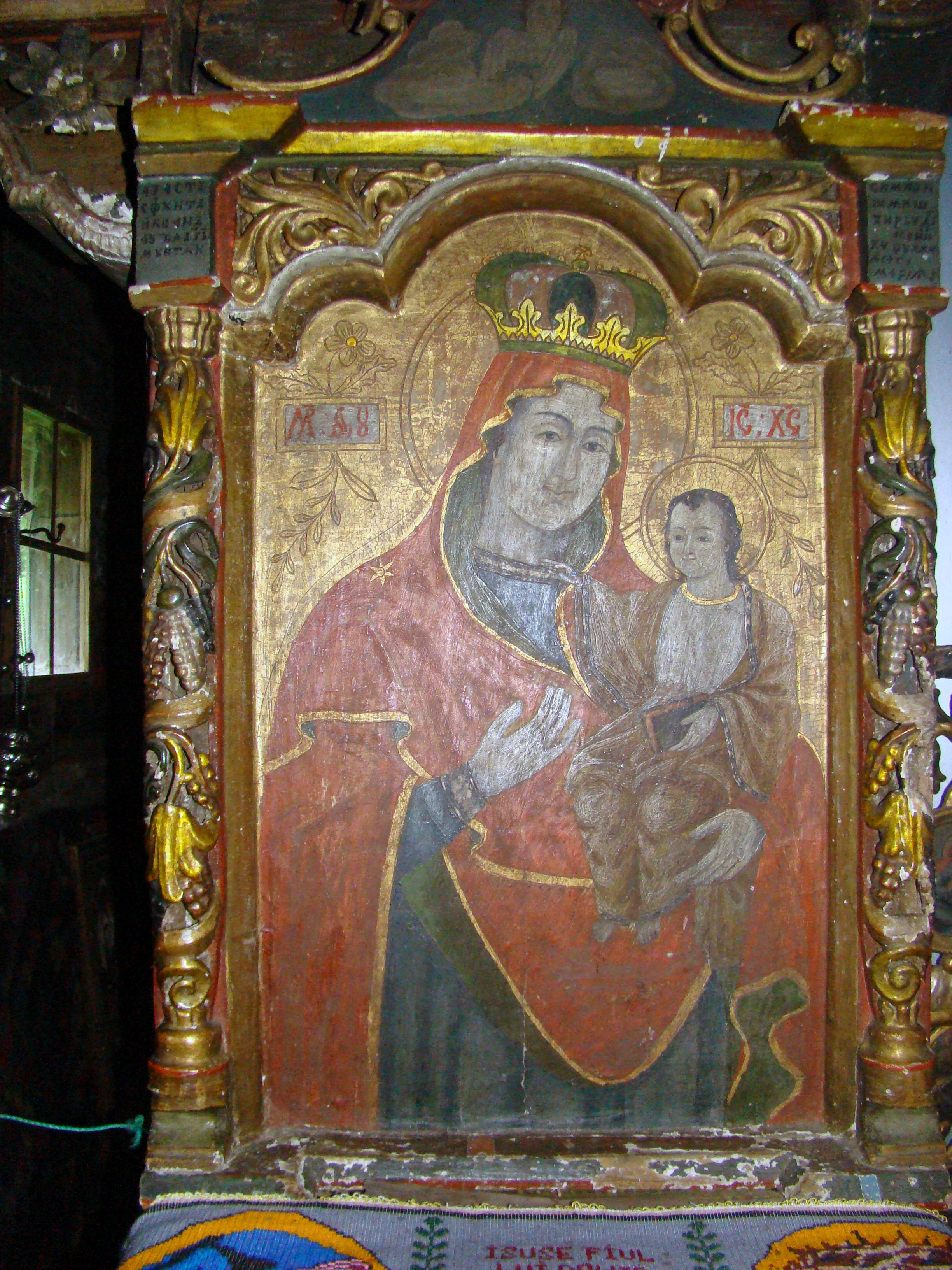 Biserica de lemn "Cuvioasa Paraschiva" , sat POIENILE IZEI